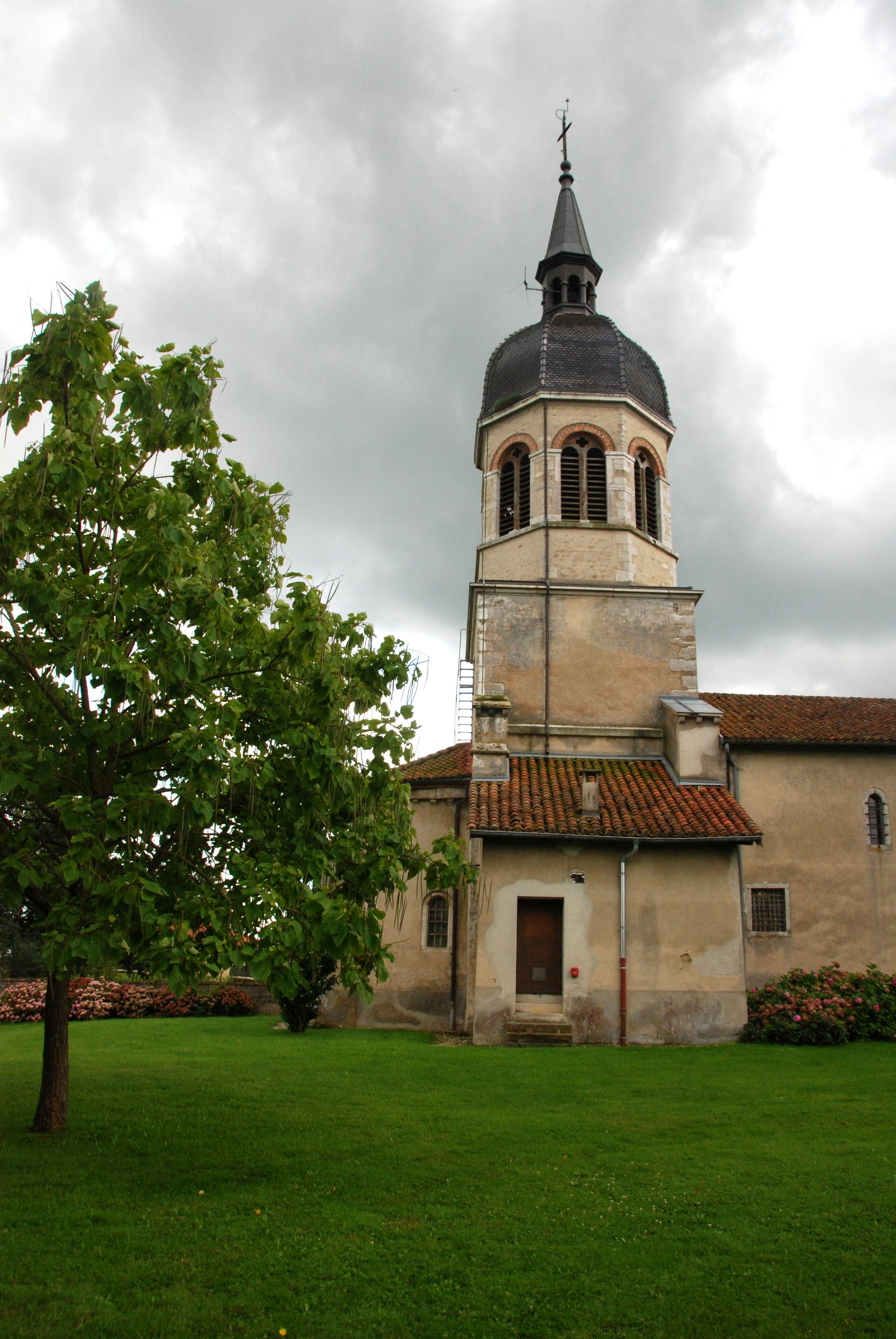 Église Saint-Julien de Condeissiat